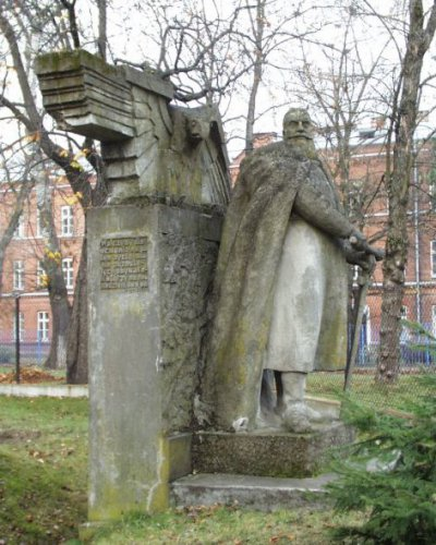 Pomnik Jana Karola Chodkiewicza w Komorowie (gmina Ostrów Mazowiecka), autor rzeźby Wojciech Durek.